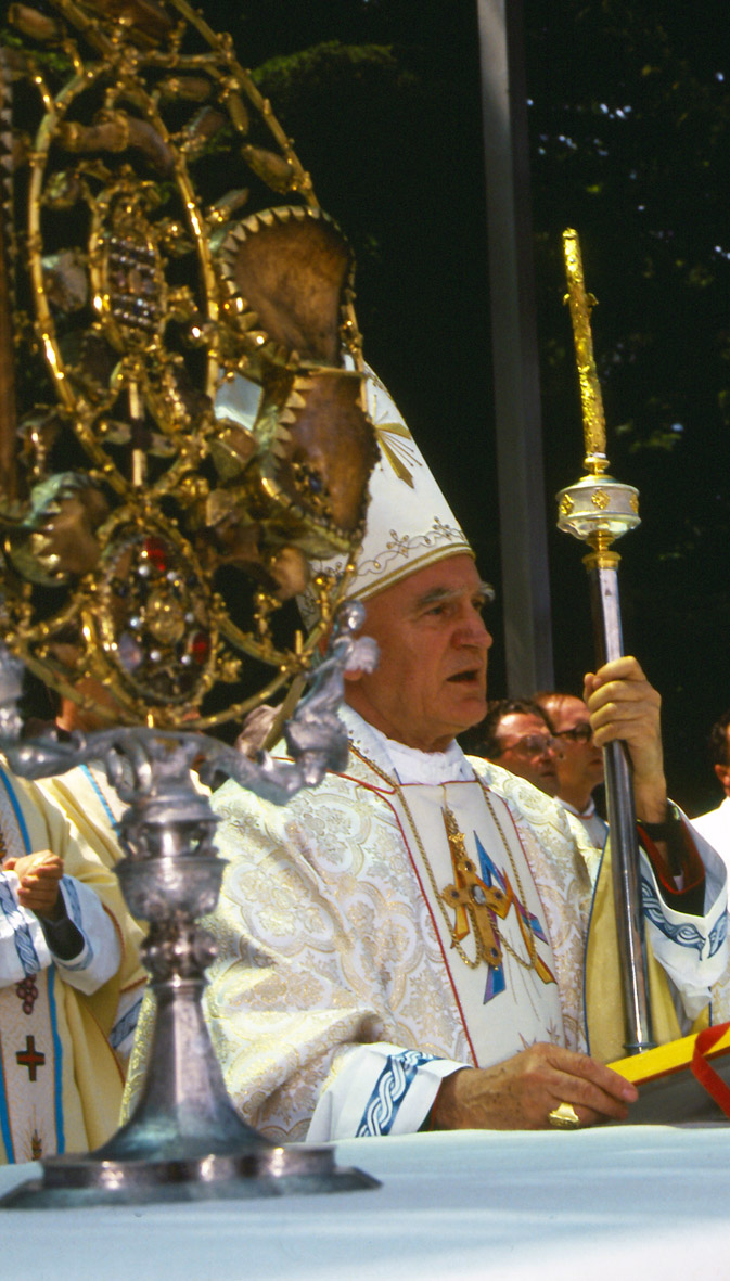 Franjo Kuharić, zagrebački nadbiskup na Trsatu u svibnju 1991. godine na proslavi 700. obljetnice svetišta Gospe Trsatske